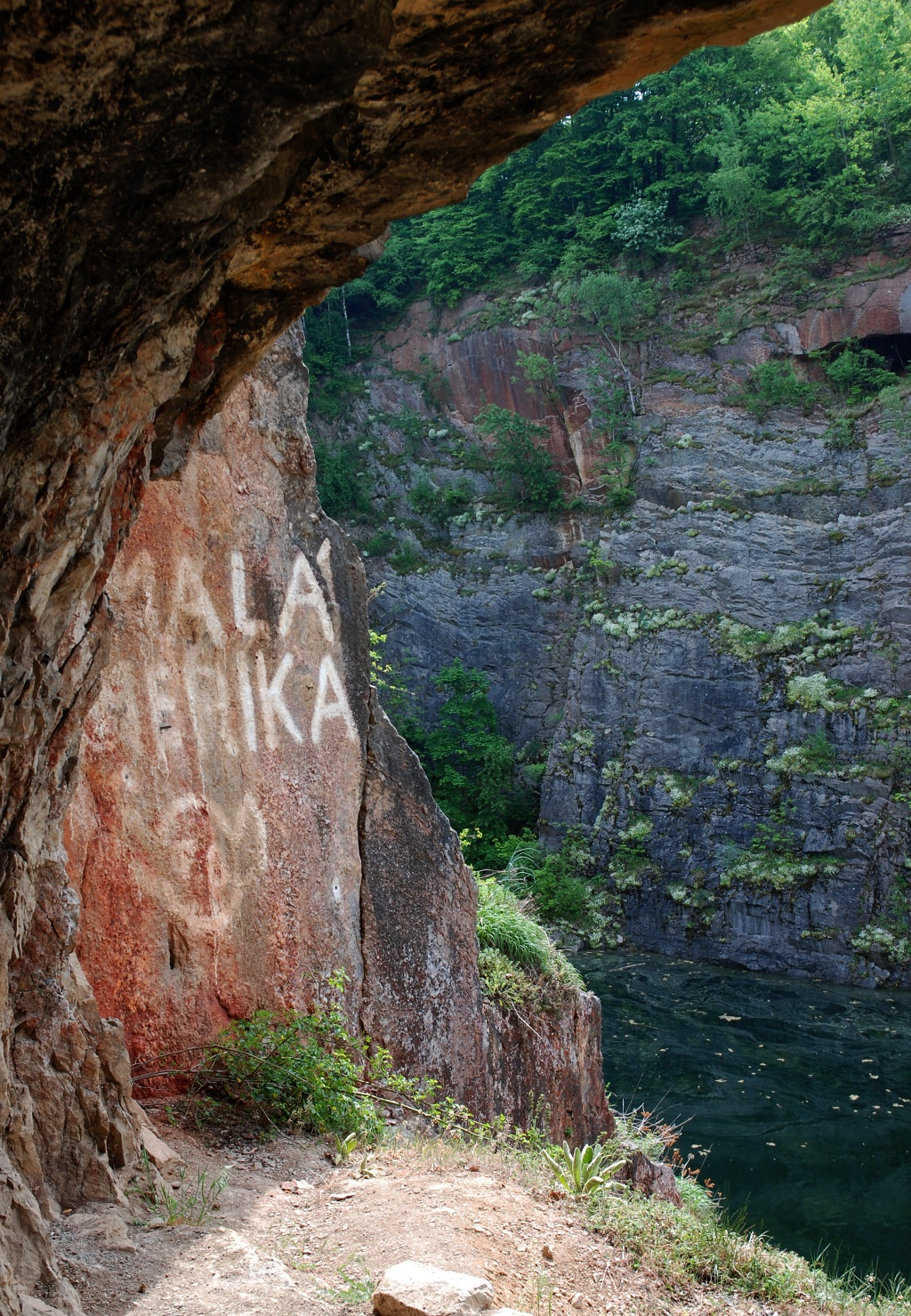 Pohled do Malé Ameriky z tzv. galérie